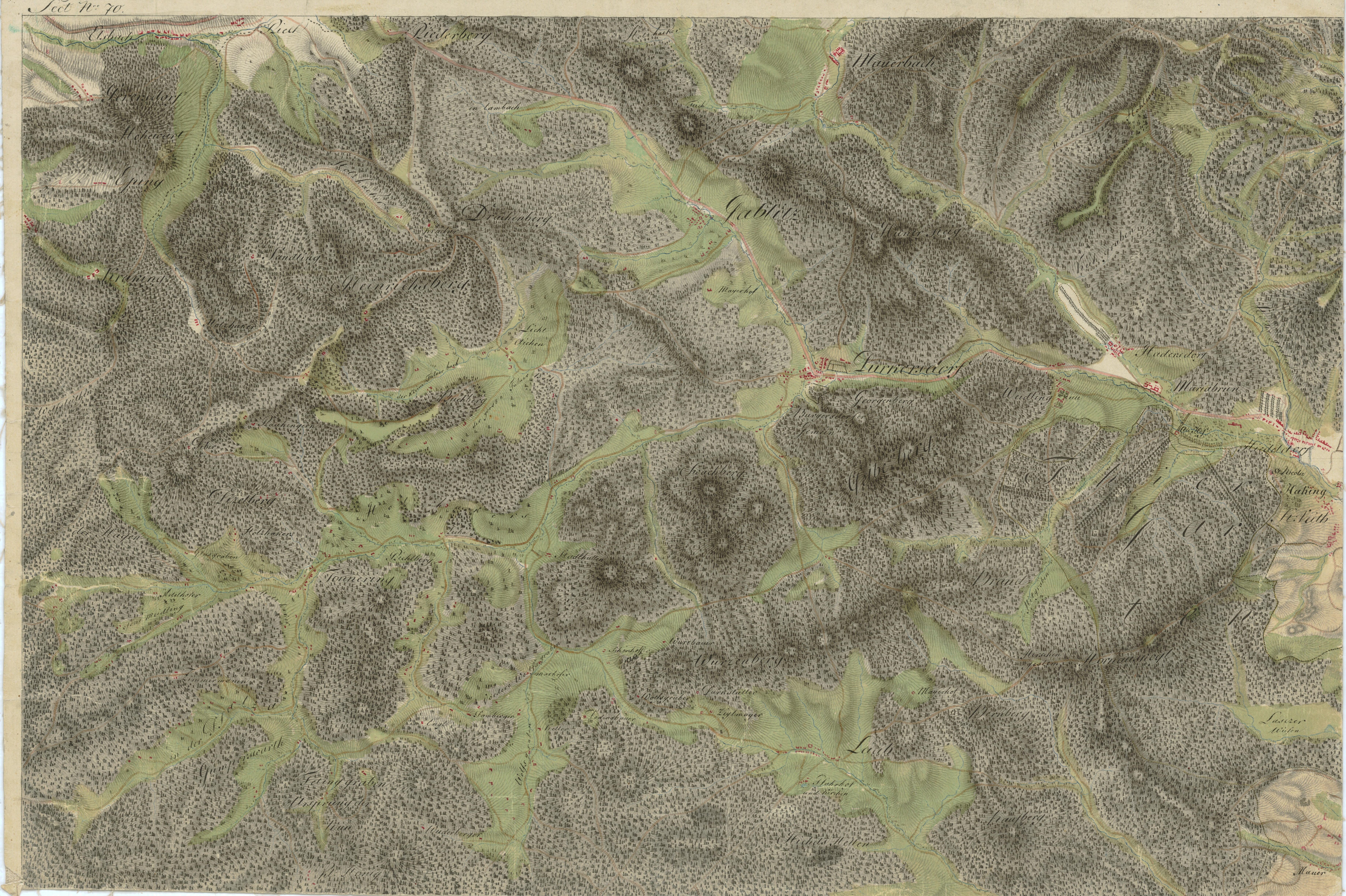 historische Landkarte BIXa242_sectio 070c Josephinische Landesaufnahme: Wienerwald, Gebiet von Gablitz, Hütteldorf, Purkersdorf, Laab, Lainzer Tiergarten südwestlich von Wien, Niederösterreich, Österreich